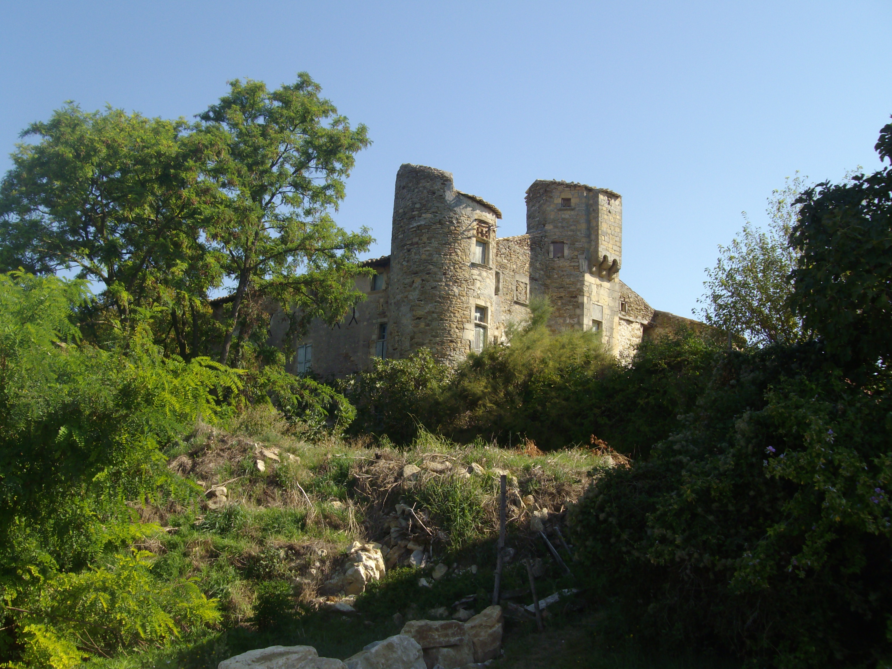 Château (1347)